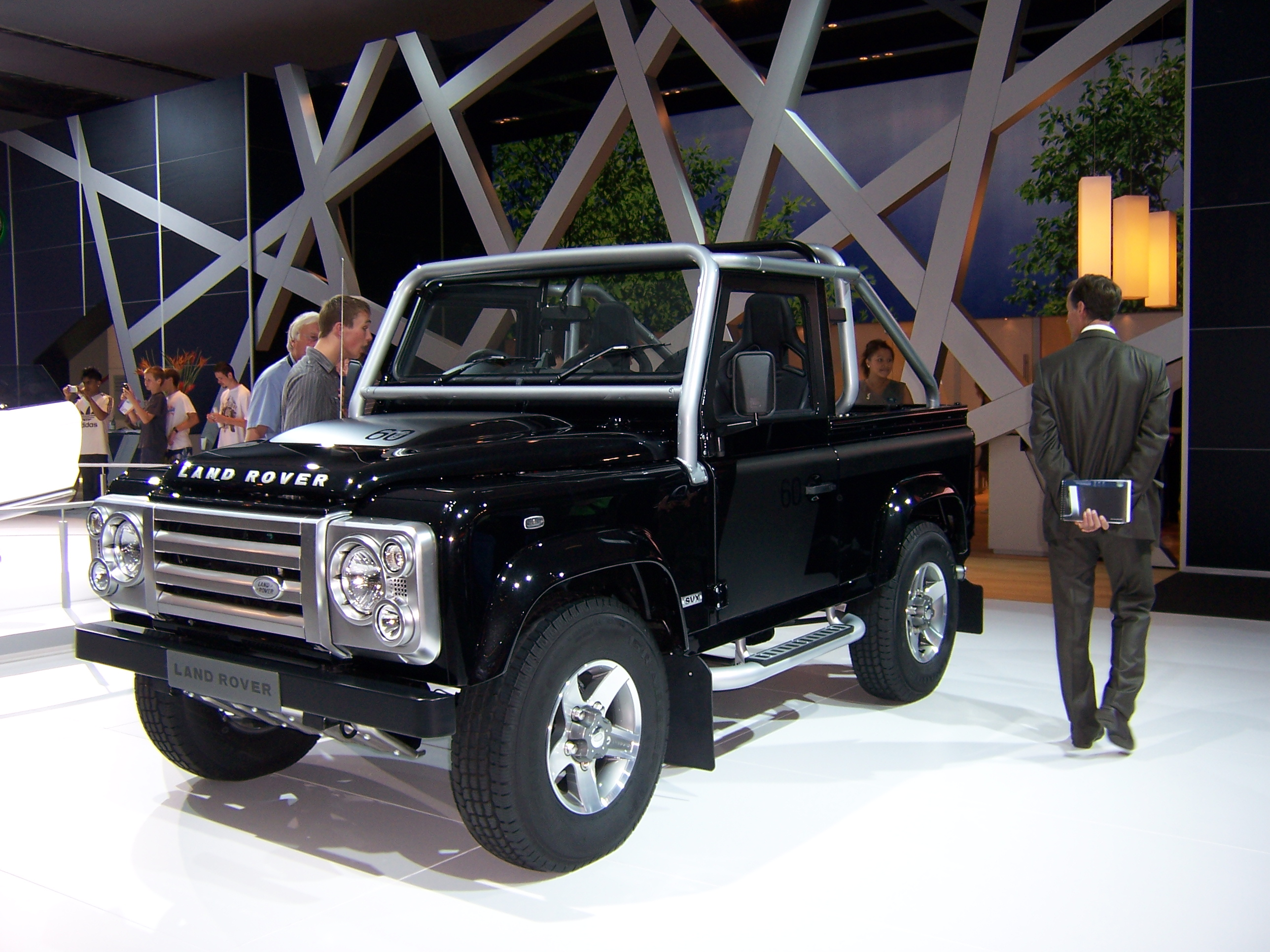 Land Rover Defender